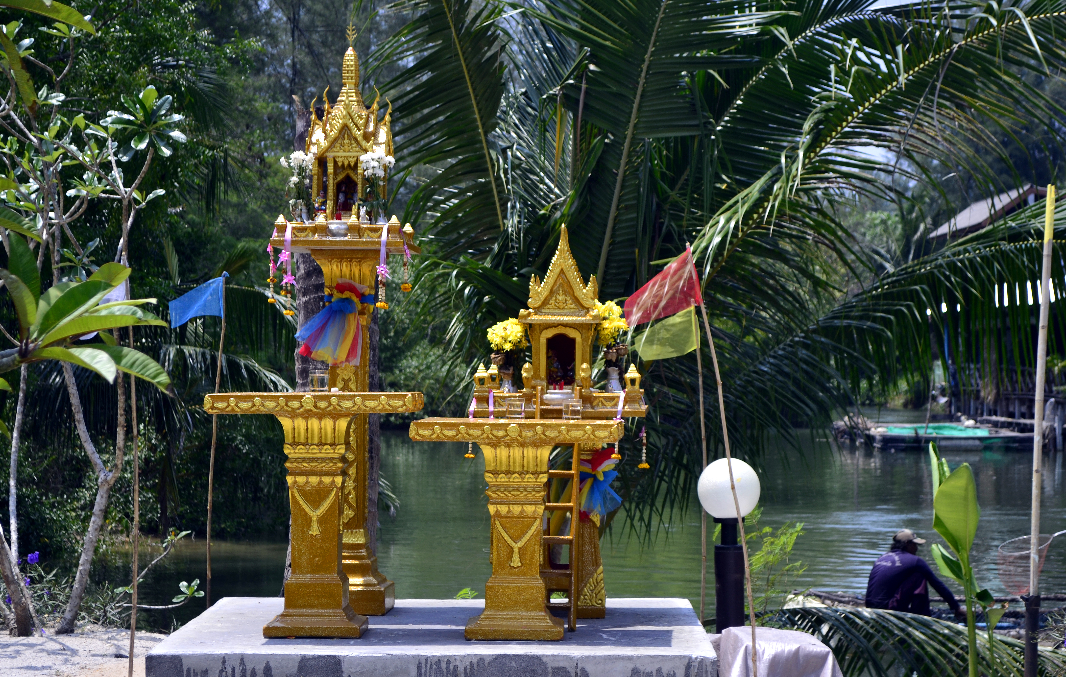 Geisterhäuschen in Koh Kho Khao Pier, Koh Kho Khao, Phangnga